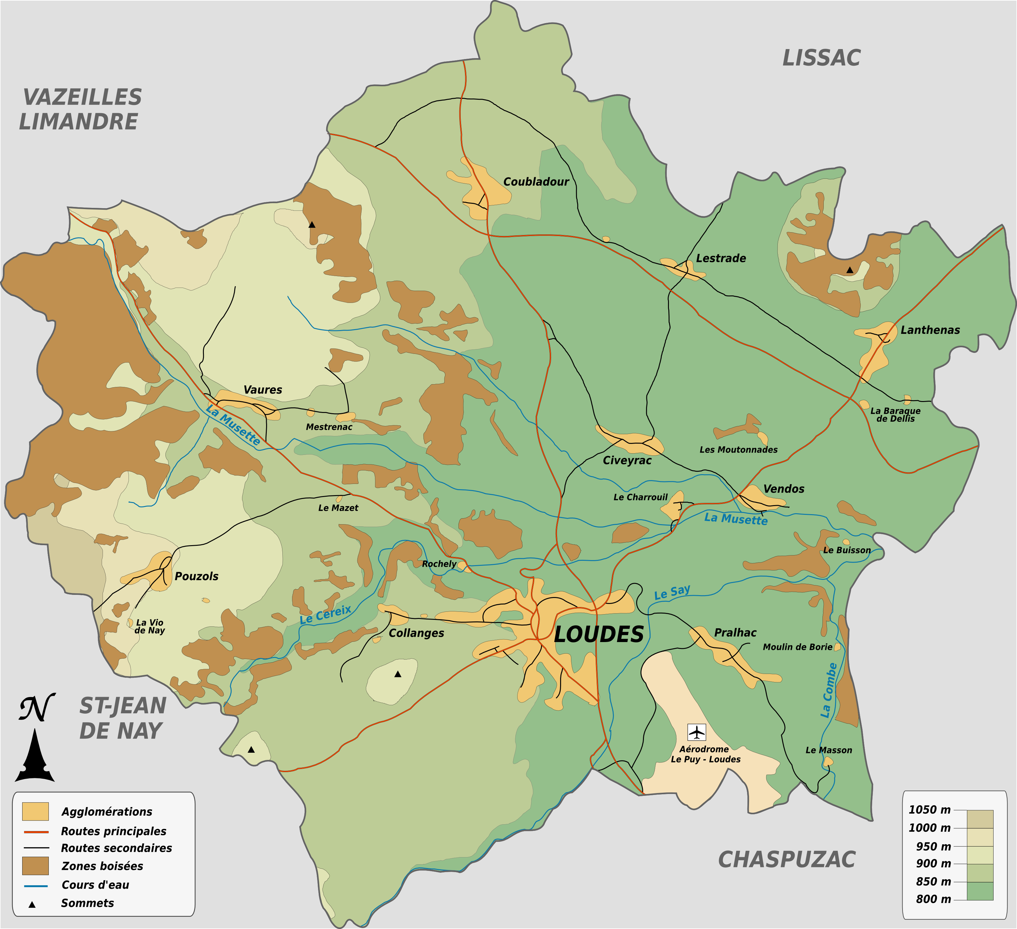 Plan de la commune de Loudes